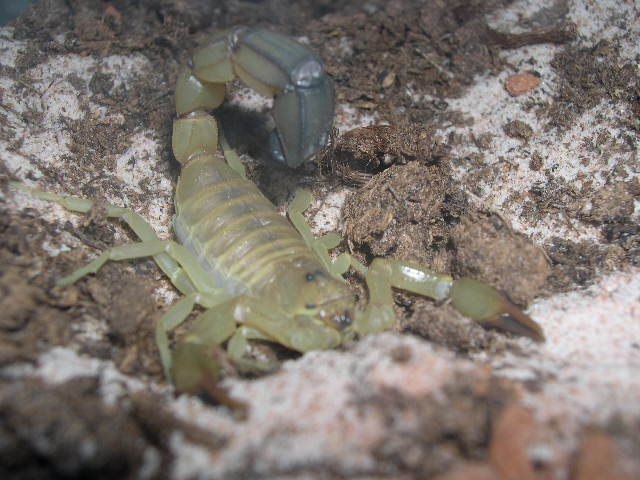 Androctonus australis hector appartenant a Gilou , éleveur de scorpions (utilisateur d'insectopia)